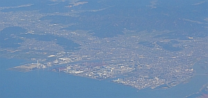 上空から見た高砂市 2011年9月7日 アシアナ航空旅客機から撮影